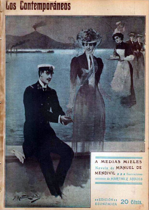 Portada de A medias mieles.